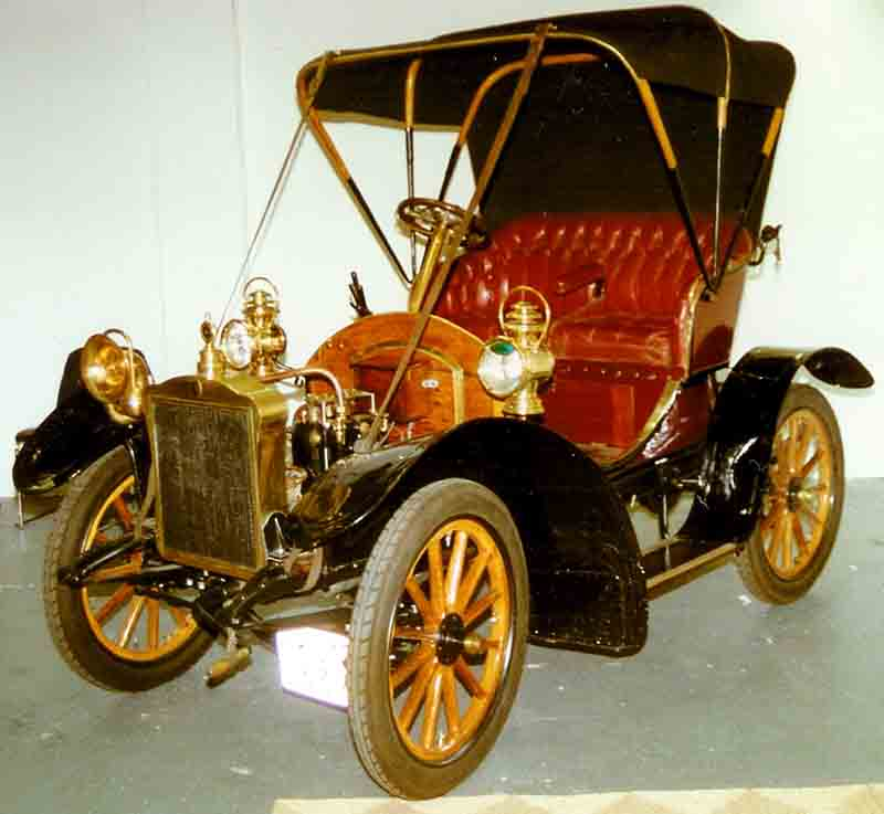 GEA Gurik Runabout 1907